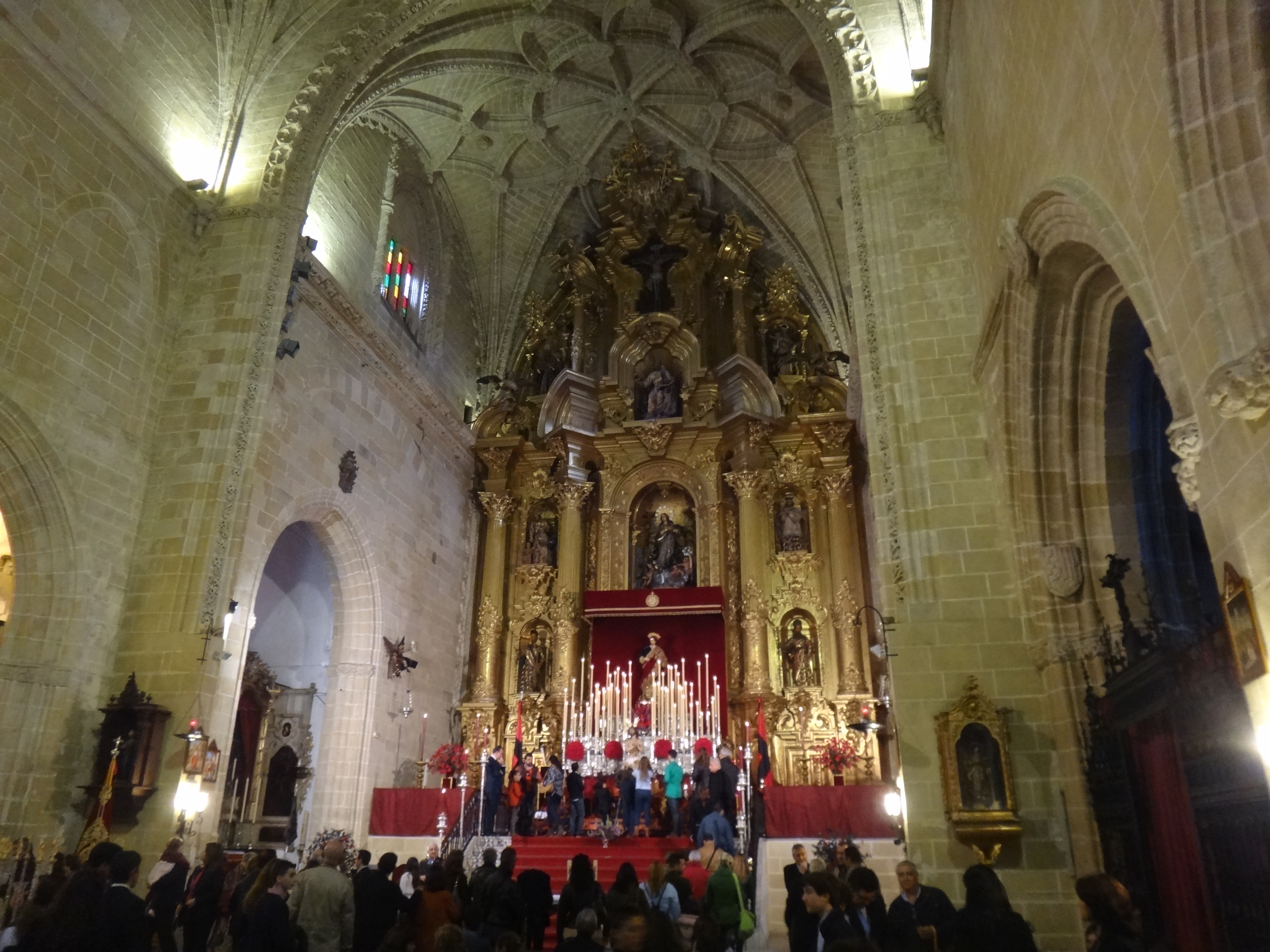 Iglesia de San Mateo en Jerez de la Frontera (Andalucía, España)